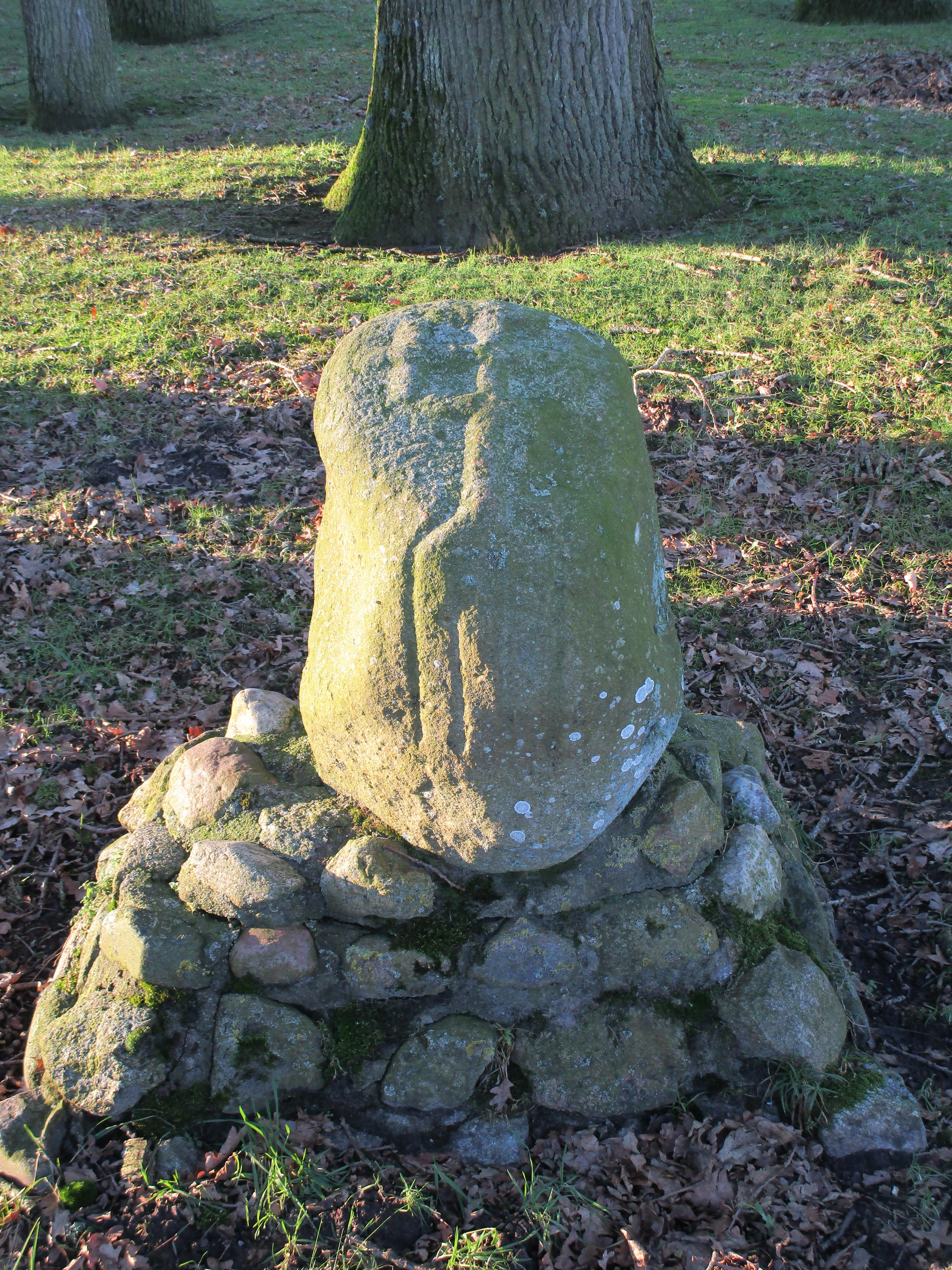 Denkmalgeschützte Anlage Tjedenstein, Wiesens